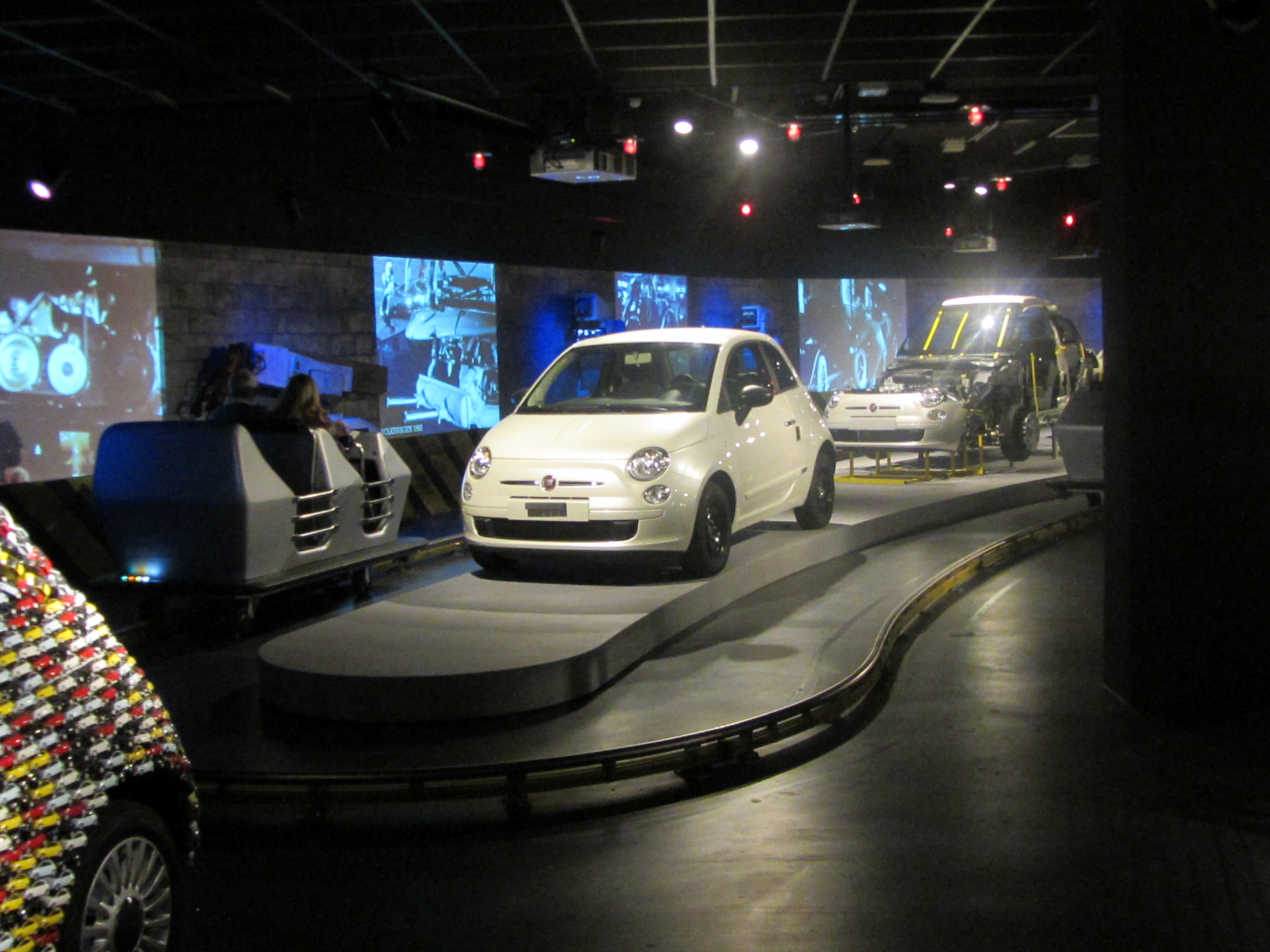 Tour su rotaia a bordo di un vagoncino a 4 posti per vedere a 360 gradi la linea di assemblaggio di una Fiat 500 (2007) dallo stampaggio alla verniciatura all'assemblaggio e alla finitura. in questa foto: visione complessiva del tour, con uno dei vagoni in funzione sulla destra